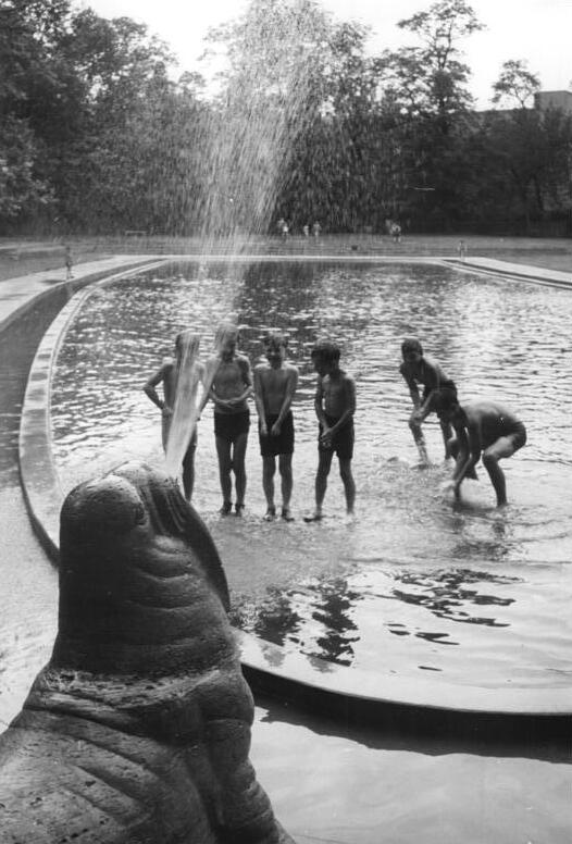 Berlin, Weißensee, Planschbecken Zentralbild Quasch. 23.6.1955 Berlin im Sommer. Ein nasses Vergnügen am neuen Planschbecken am Weißensee.